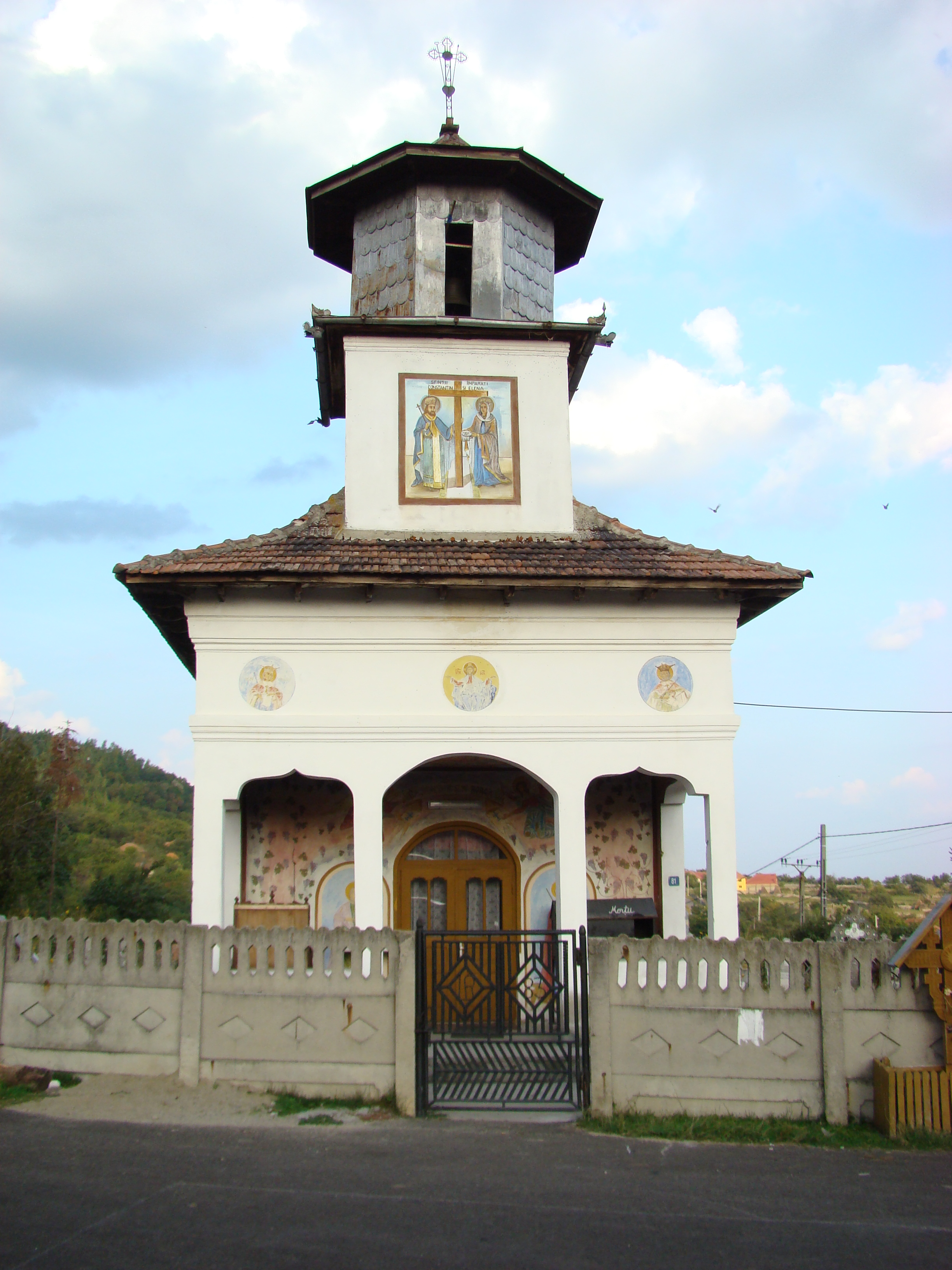 Biserica „Sfinții Îngeri” din Stâncești, județul Gorj